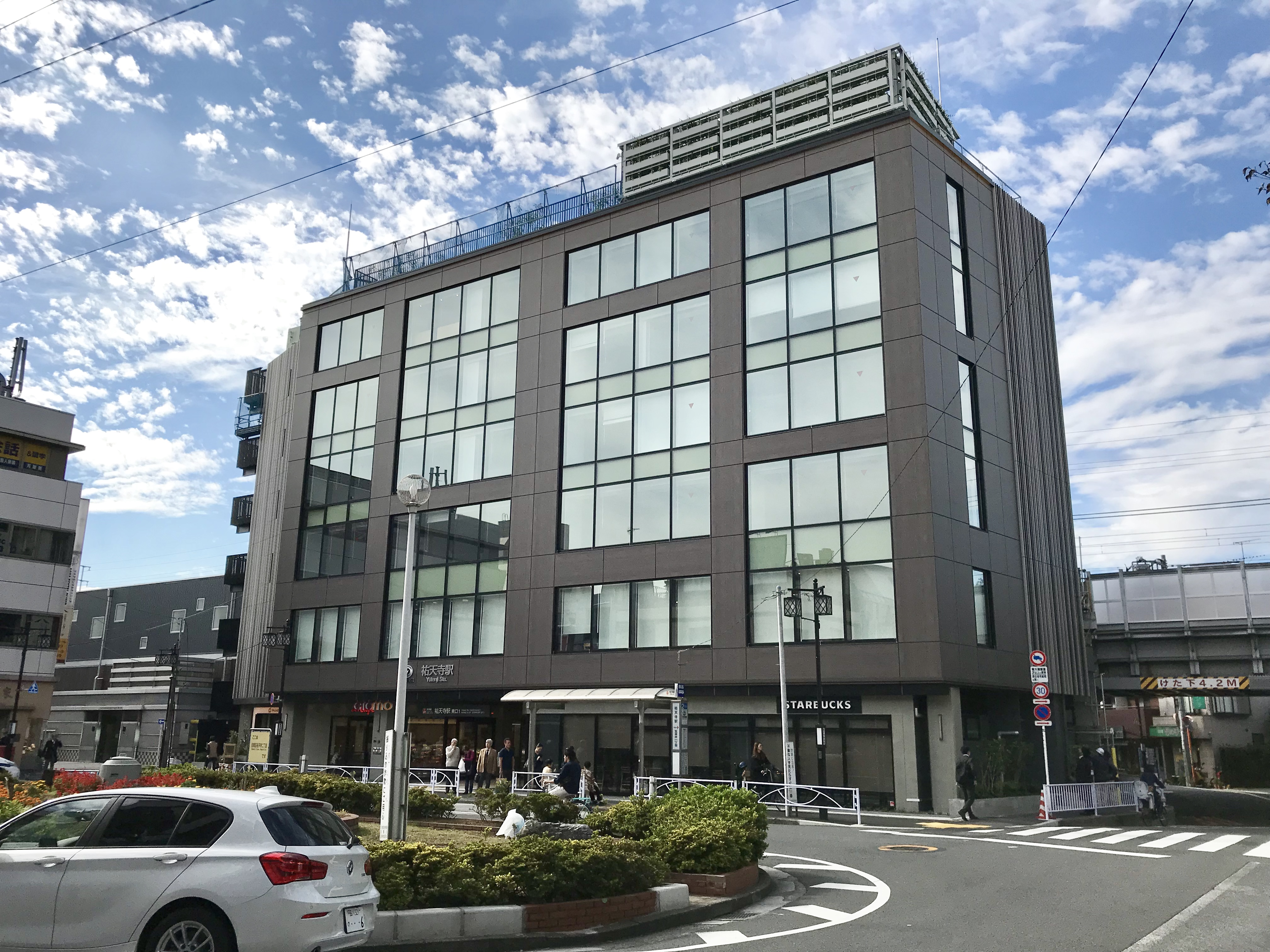 東急東横線祐天寺駅東口駅舎